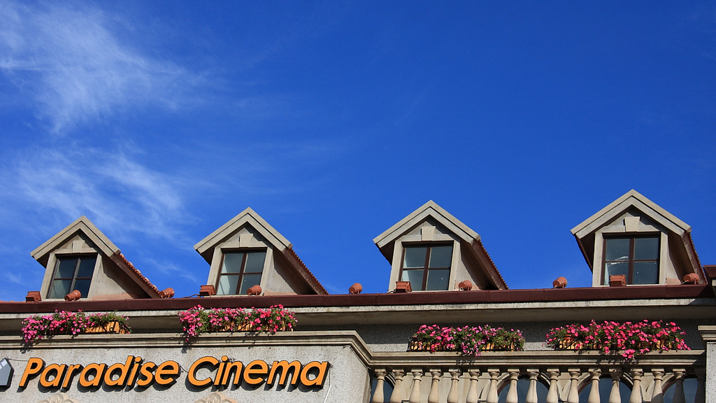 天津意式风情区